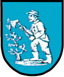 Herb Przezchlebia (gmina Zbrosławice, powiat tarnogórski, województwo śląskie, Polska)